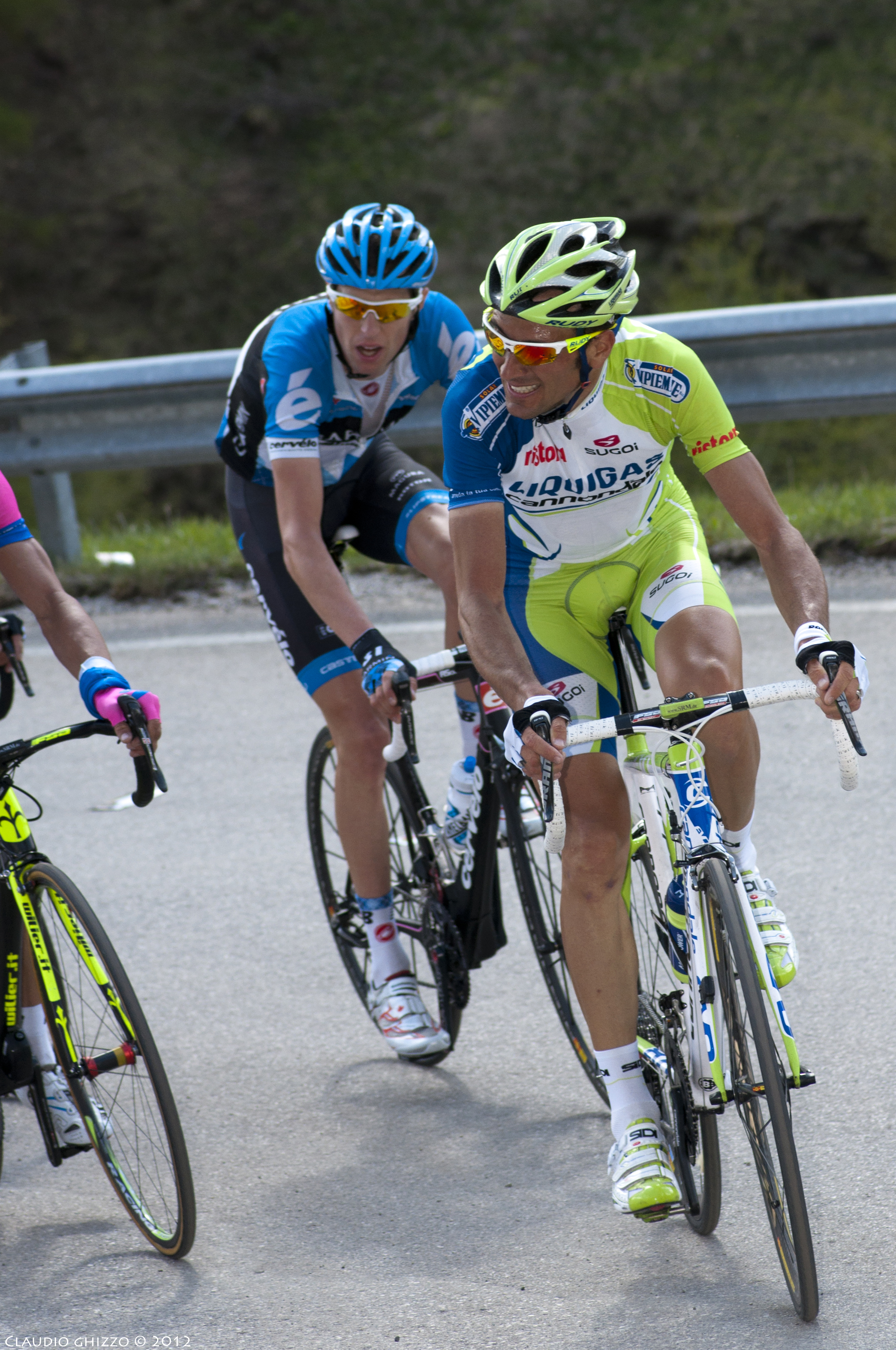 17° tappa Falzen-Cortina D'ampezzo (salita passo Giau)